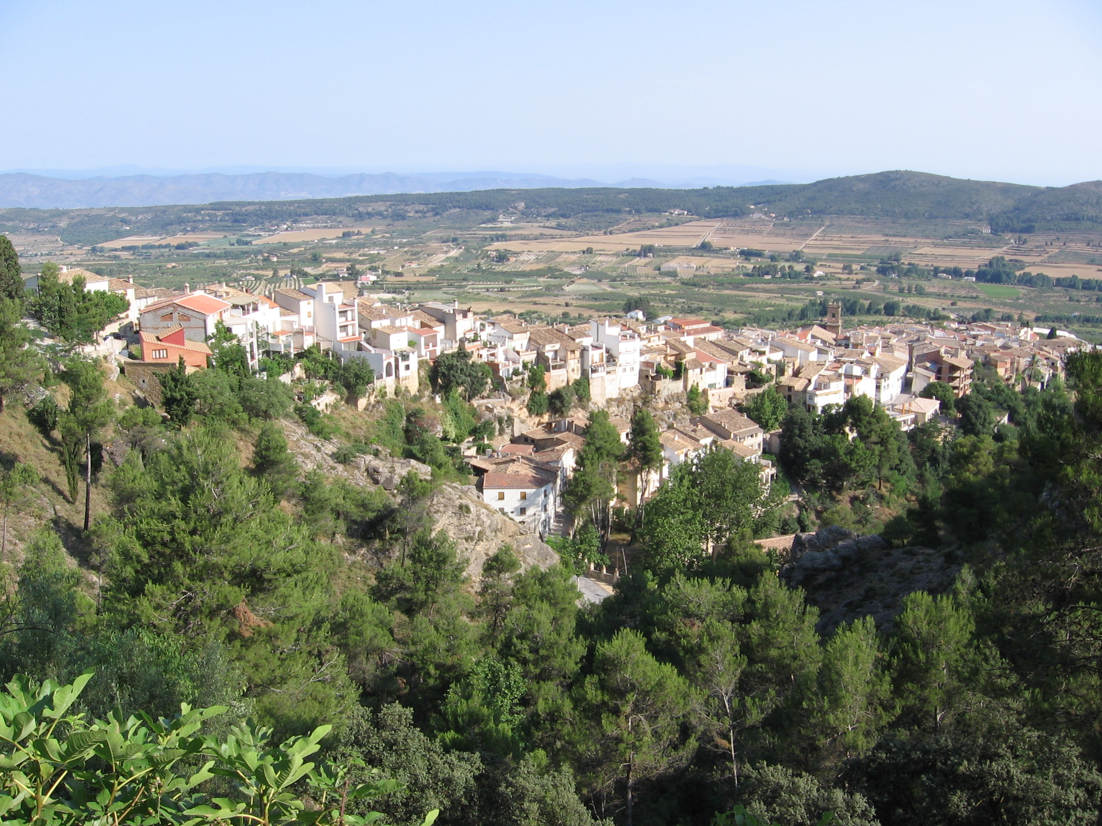 Agres bajando desde el Montcabrer, en Alicante (España) Autor: José Fco. Català Senent